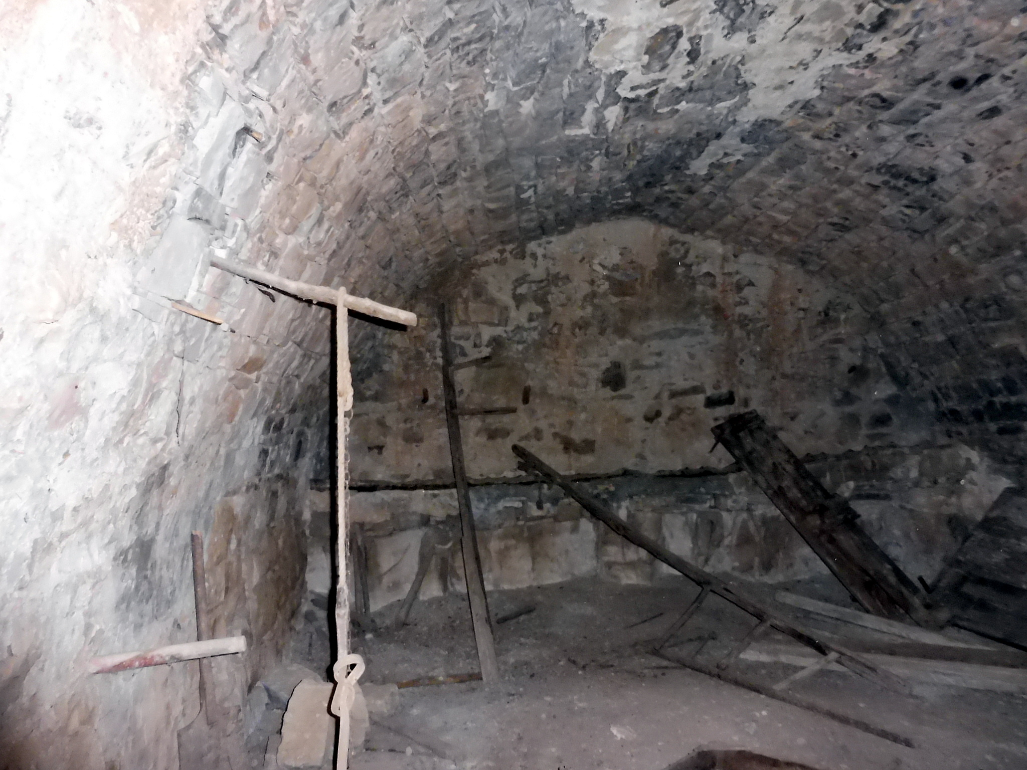 Cabana de volta de Cal Serè (Granyena de Segarra) This is a a photo of a natural area in Catalonia, Spain, with id: ES510254